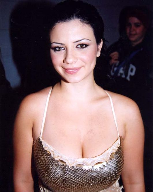 Ninet Tayeb